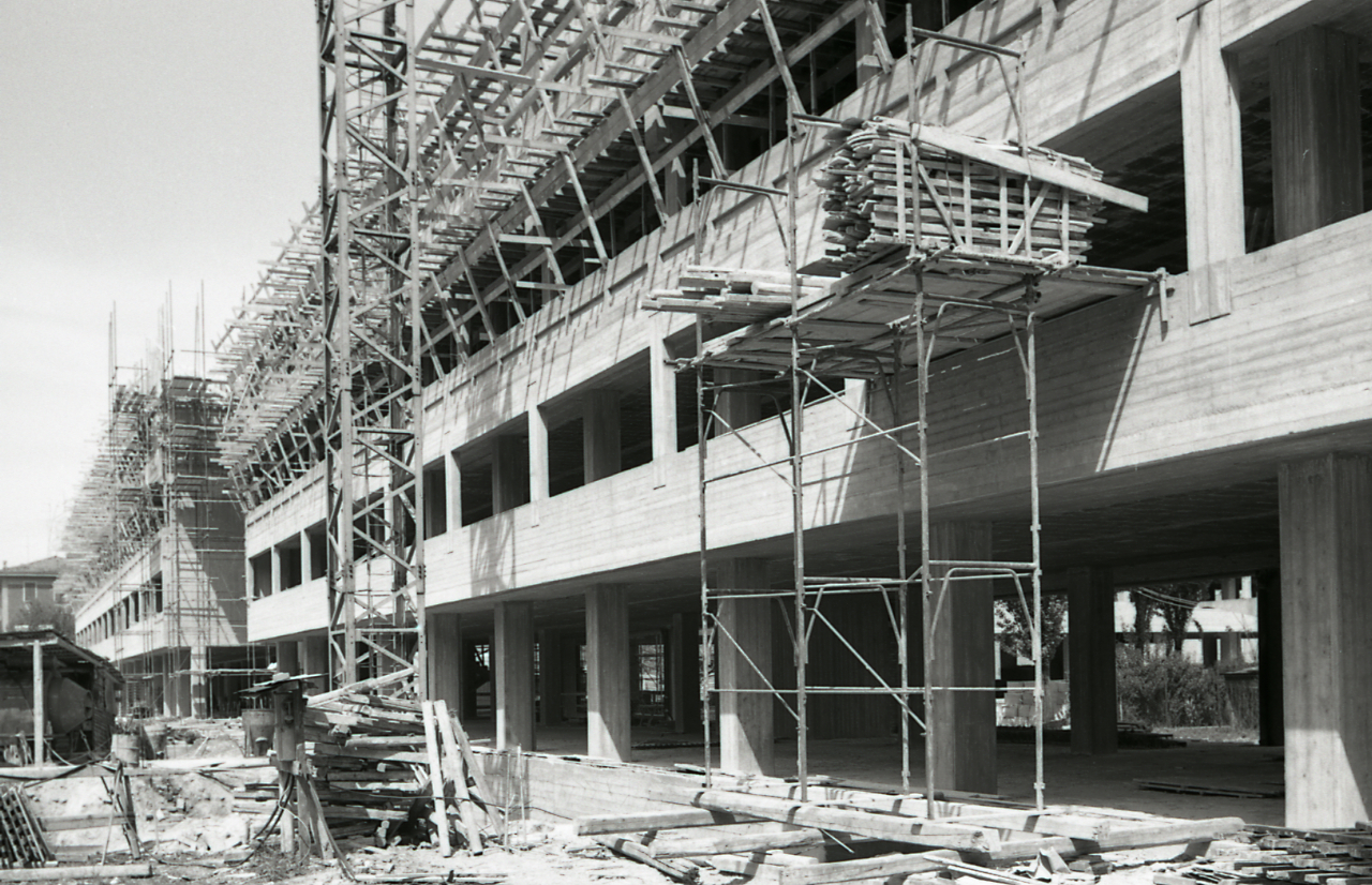 Servizio fotografico : Bologna, 1970 / Paolo Monti. - Strisce: 7, Fotogrammi complessivi: 37 : Negativo b/n, gelatina bromuro d'argento/ pellicola ; 35 mm. - ((I fotogrammi hanno una doppia numerazione. . - Sul portanegativi: Nik-mat Pan F Ilford. - Sul dorso del portanegativi Monti specifica: "Arch. Leone Pancaldi. Bologna. Cantiere Grande edificio di via". - Occasione: Documentazione del cantiere di un grande edificio per l'architetto Pancaldi Leone. - Fonte: Agenda di Paolo Monti: Monti - Agenda 1970 (1970/04/28), presso Archivio Paolo Monti